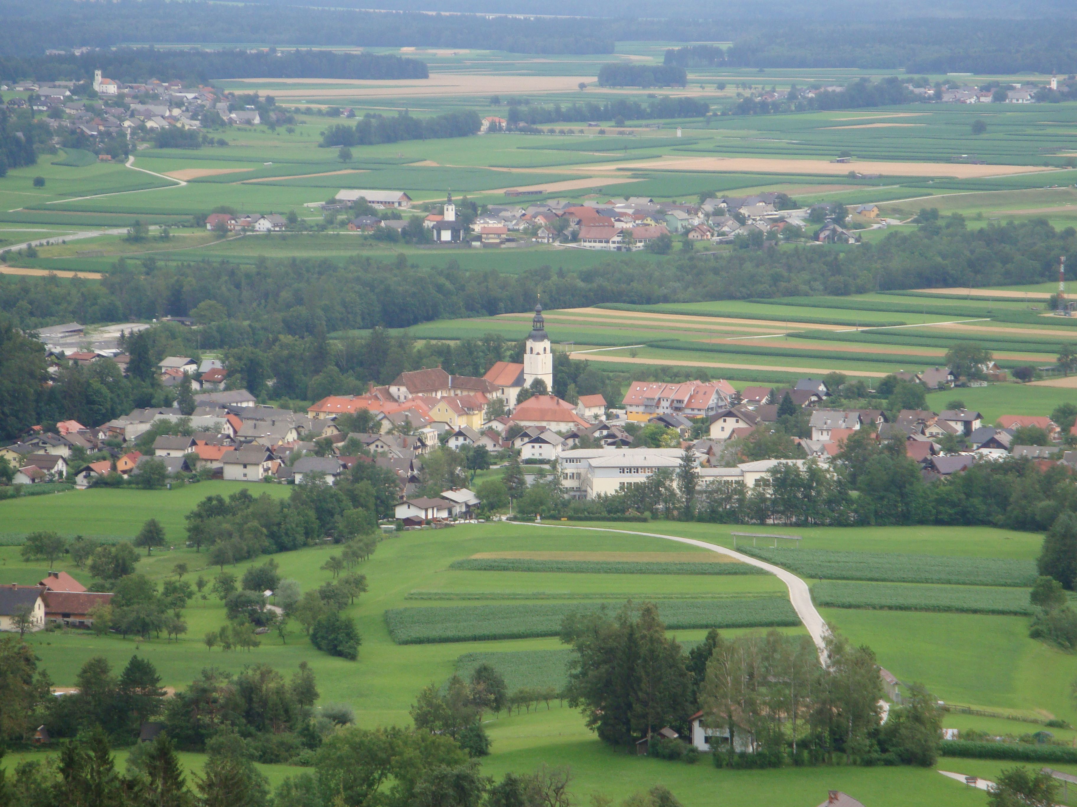 Pogled na Preddvor iznad cerkve svetega Miklavža nad Mačami, Slovenija.